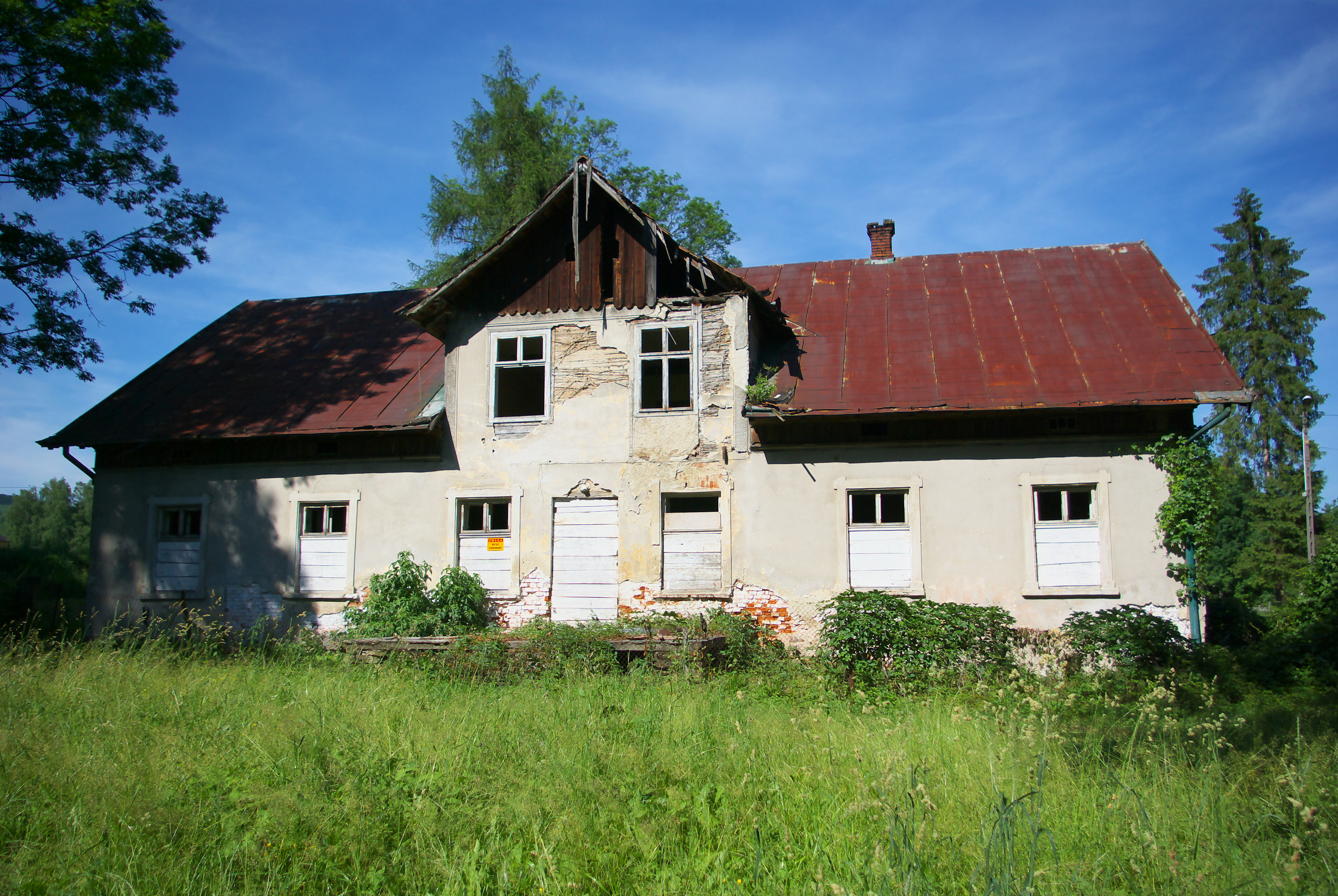 Budynek dworu w Falejówce